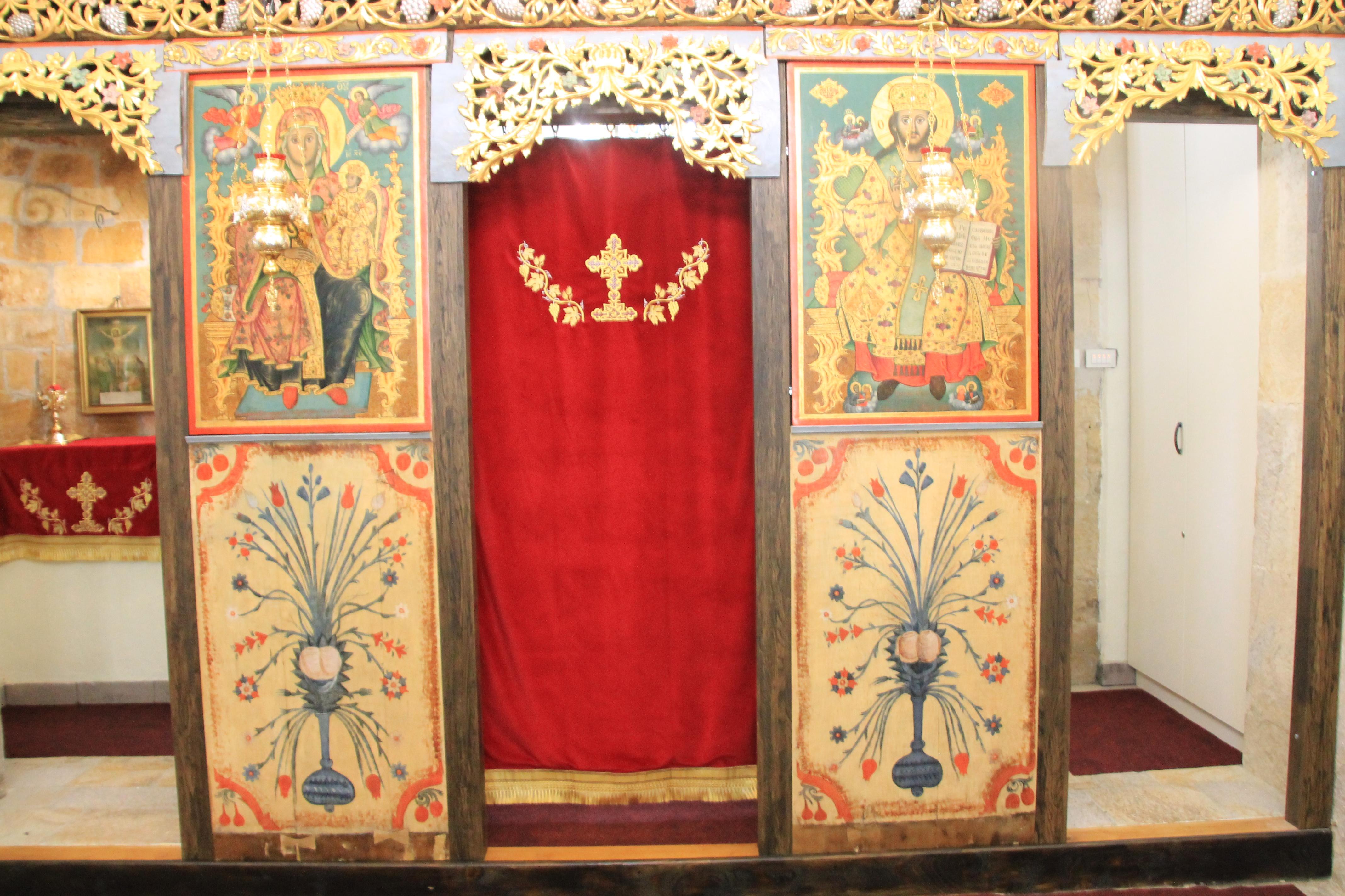 Crkva Svetog Save na Savincu